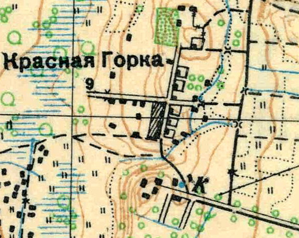 Топографическая карта Ленинградской области, квадрат О-35-9-Г-г (Косколово), деревня Красная Горка